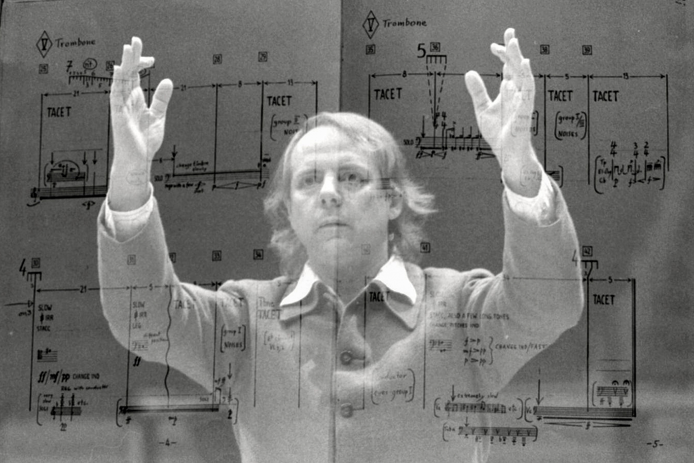 Karlheinz Stockhausen en surimpression de la partition d'une de ses composition, Strasbourg, 1980. Karlheinz Stockhausen né le 22 août 1928 à Mödrath, Allemagne, et mort le 5 décembre 2007 à Kürten, Allemagne est un compositeur allemand. Son travail se construit autour de la musique électroacoustique, de la spatialisation du son et, les dernières années, de longs cycles de création qui aboutissent à des œuvres monumentales.